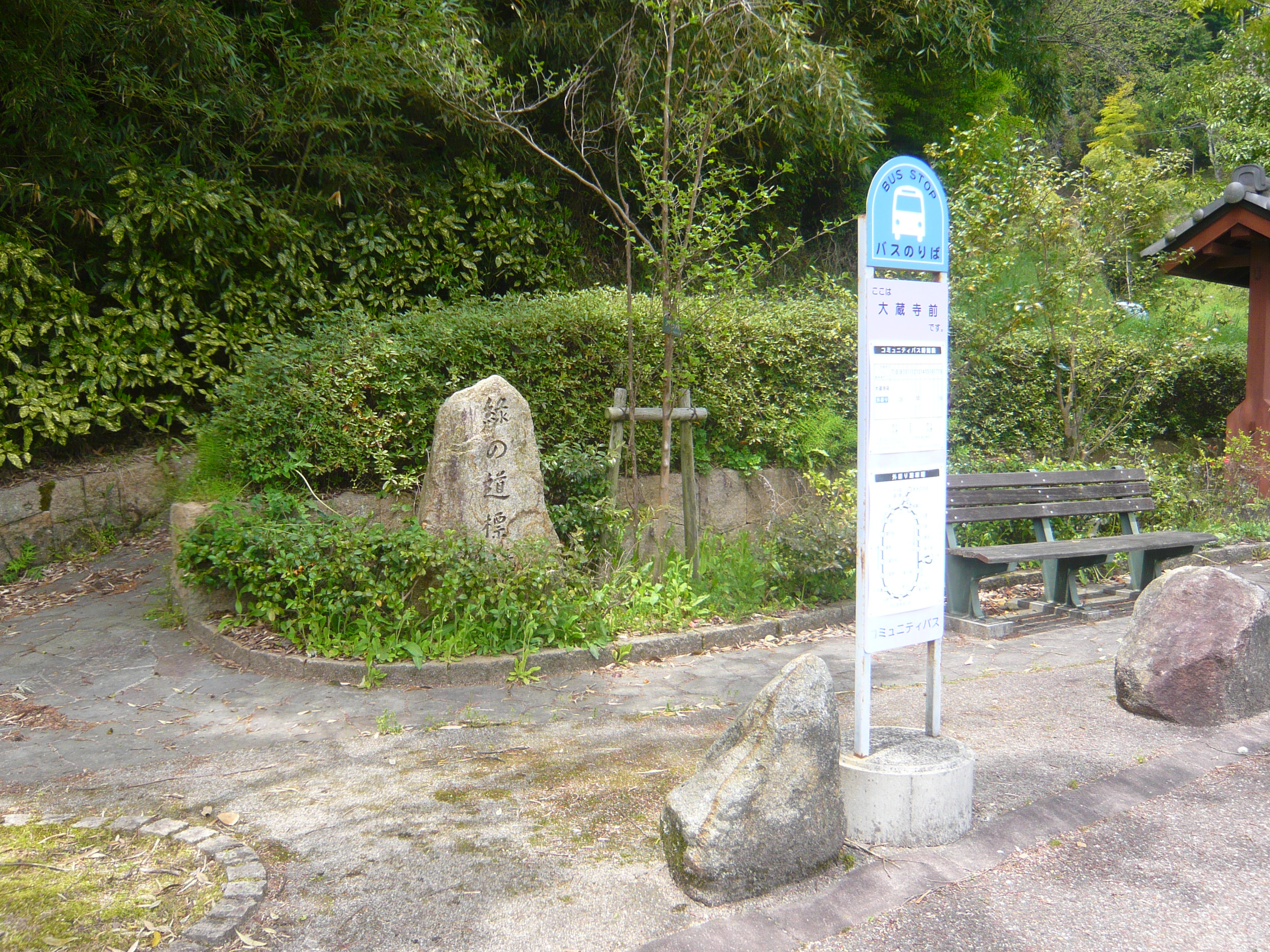 大蔵寺バス停と「緑の道標」 宇陀市大宇陀栗野にて 2011.5.06